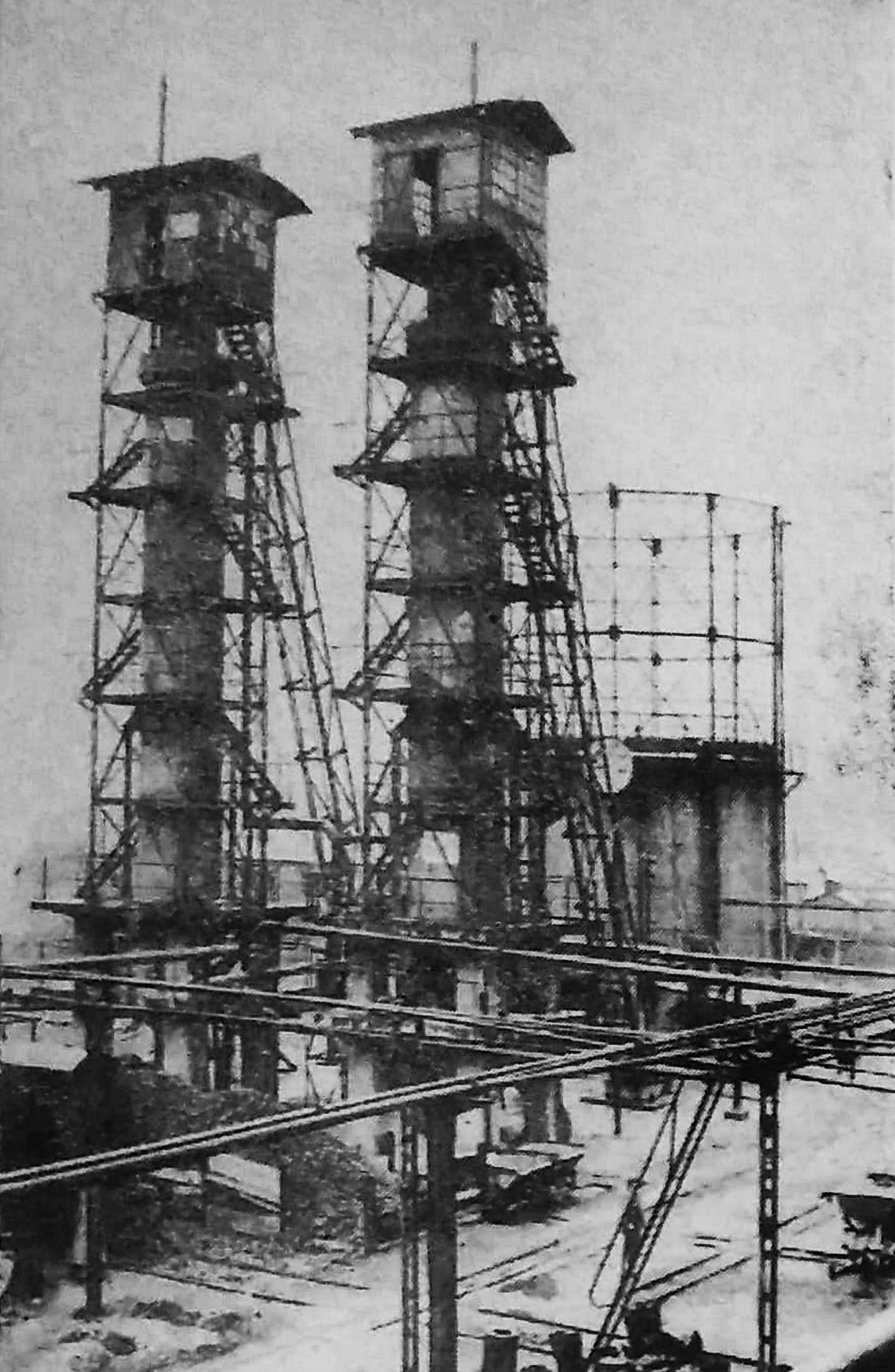 piece wapienne przy fenolowni, Zakłady Koksochemiczne Hajduki